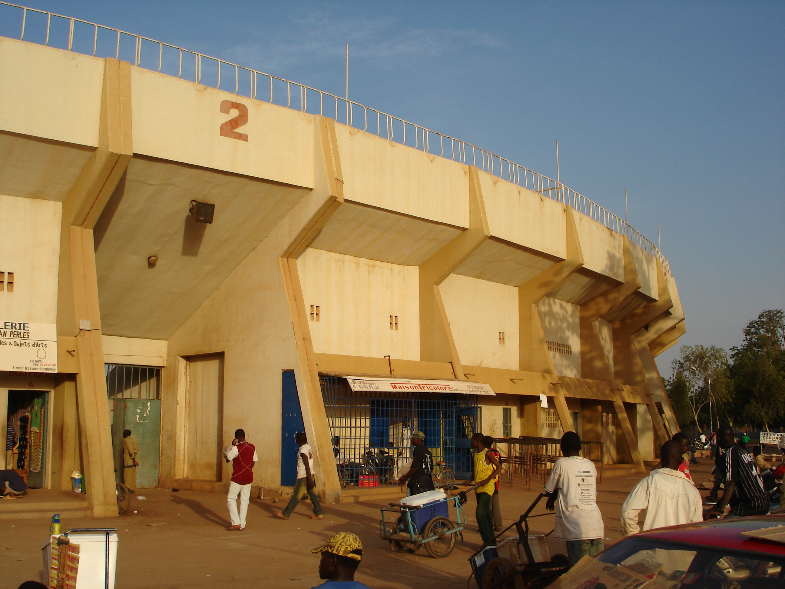 Burkina Faso: Stade municipale in Ouagadougou